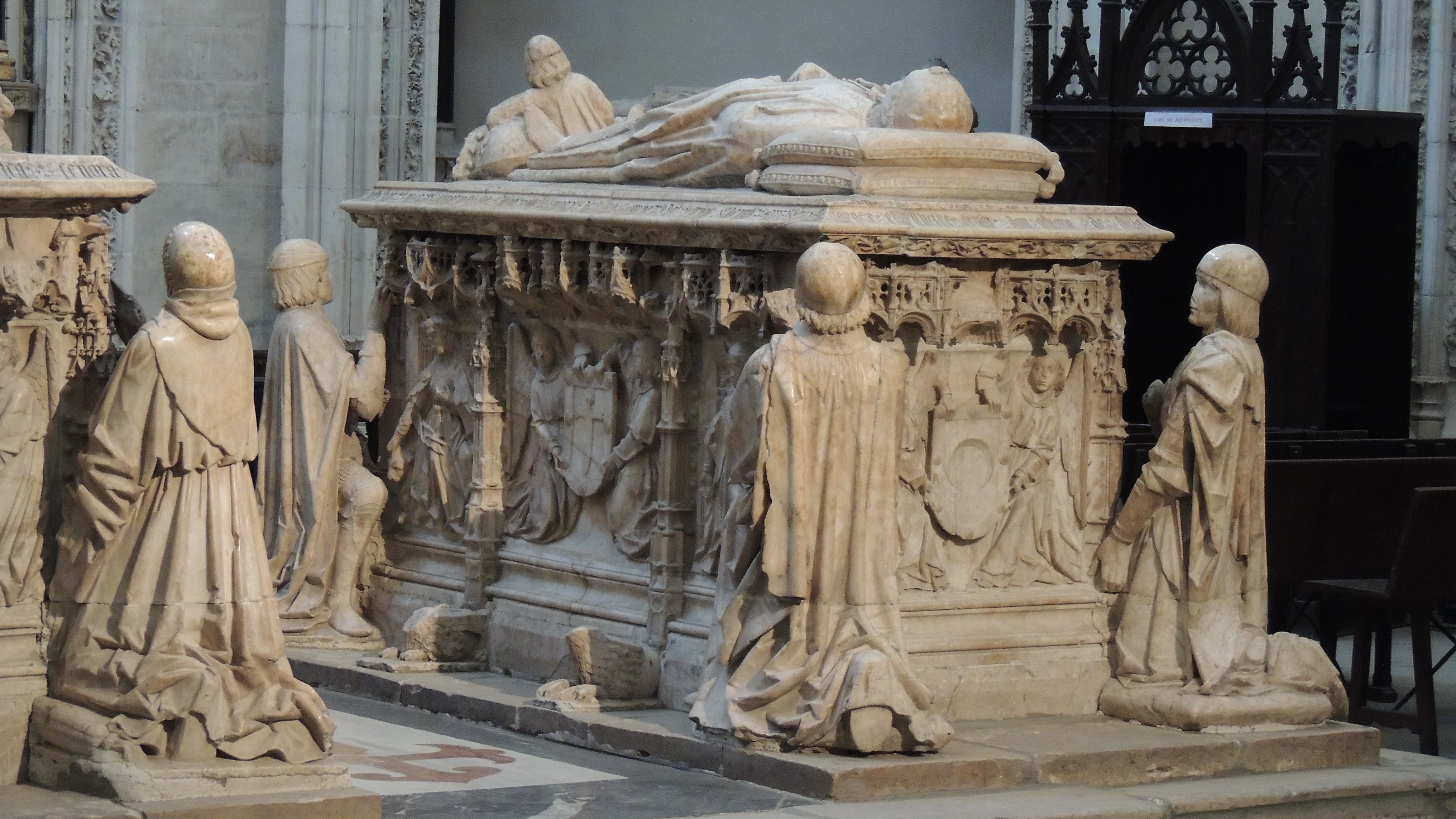 Sepulcro de Álvaro de Luna († 1453), que fue maestre de la Orden de Santiago y condestable de Castilla, en la capilla de Santiago de la catedral de Toledo, (España).